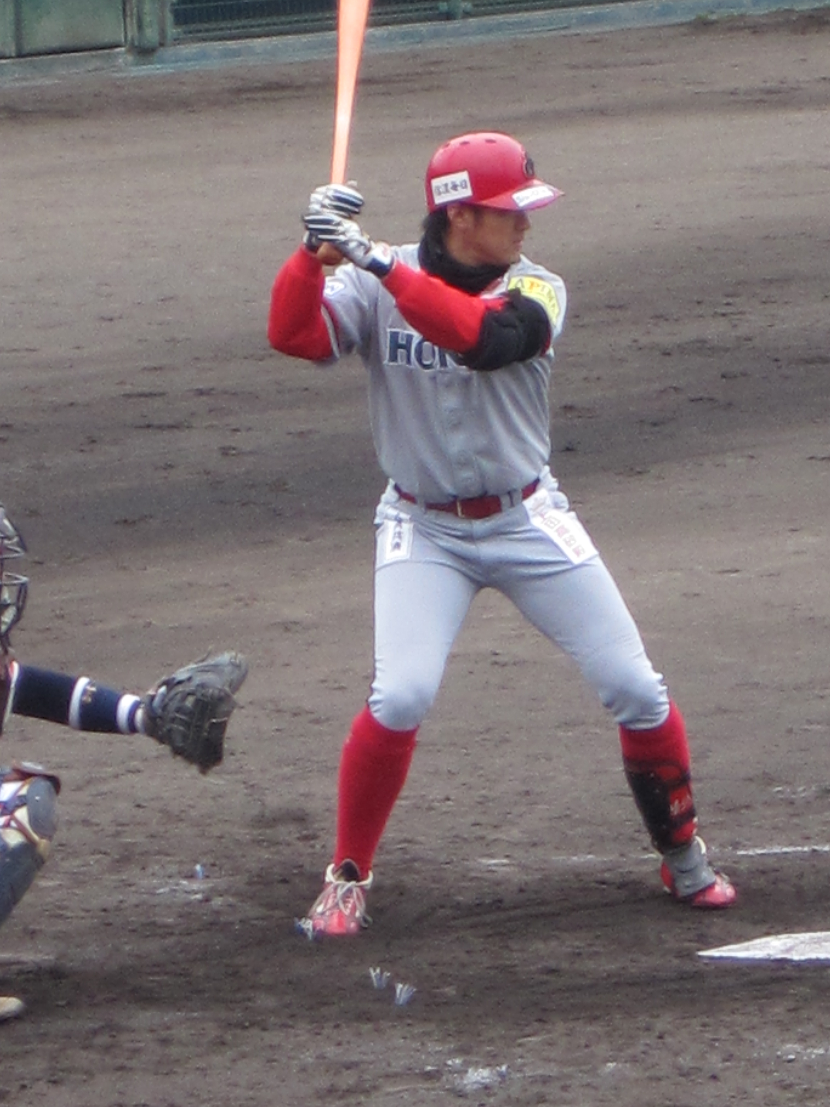 大谷尚徳選手